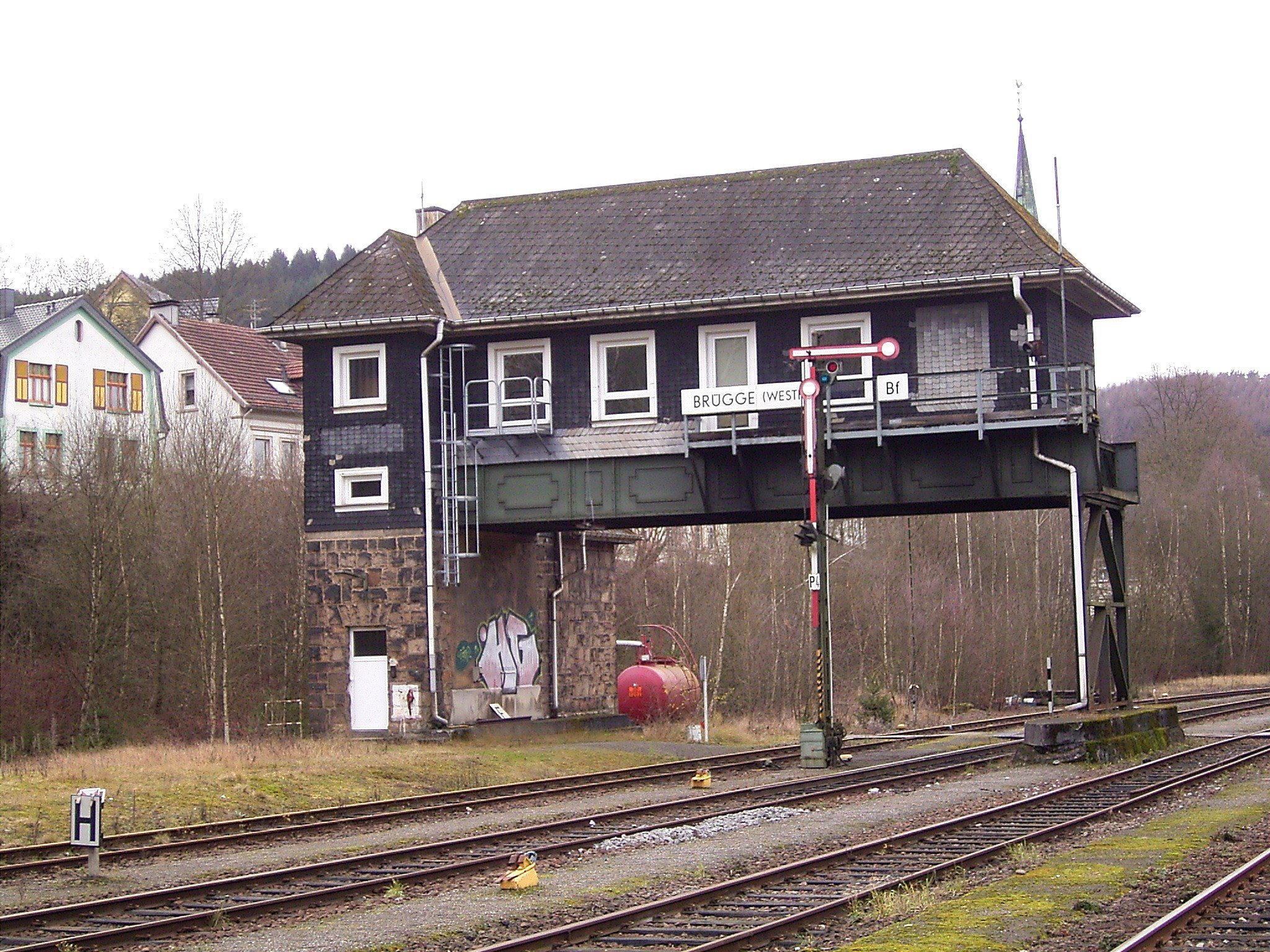 Bahnhof Lüdenscheid - Brügge